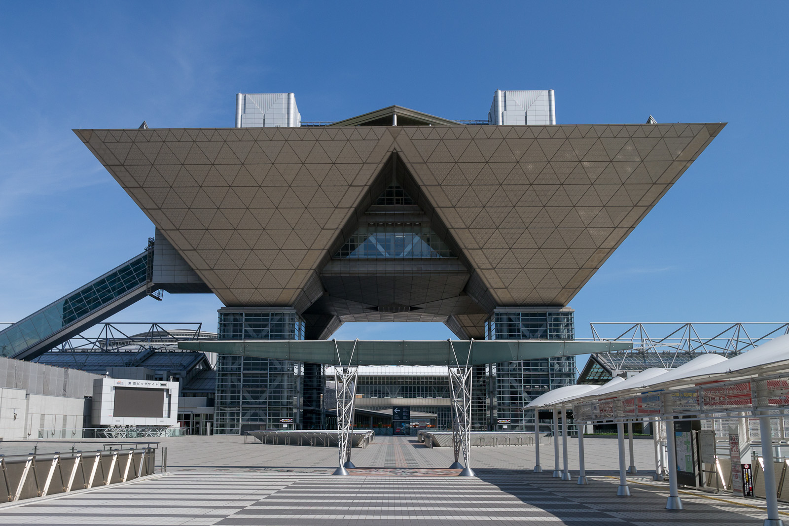 国際展示場「東京ビッグサイト」、東京都江東区。